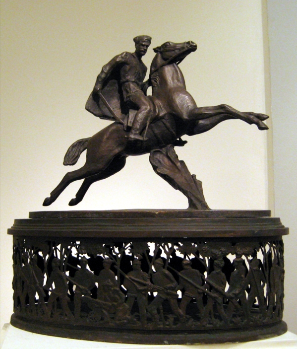 Ефимов Иван Семёнович. Эскиз неосуществленного памятника Василию Чапаеву в Алма-Ате. 1938. Модель в ГТГ. Model of non-made monument for Vasily Chapayev in Alma-Ata by I. S. Efimov. Tretiakov gallery